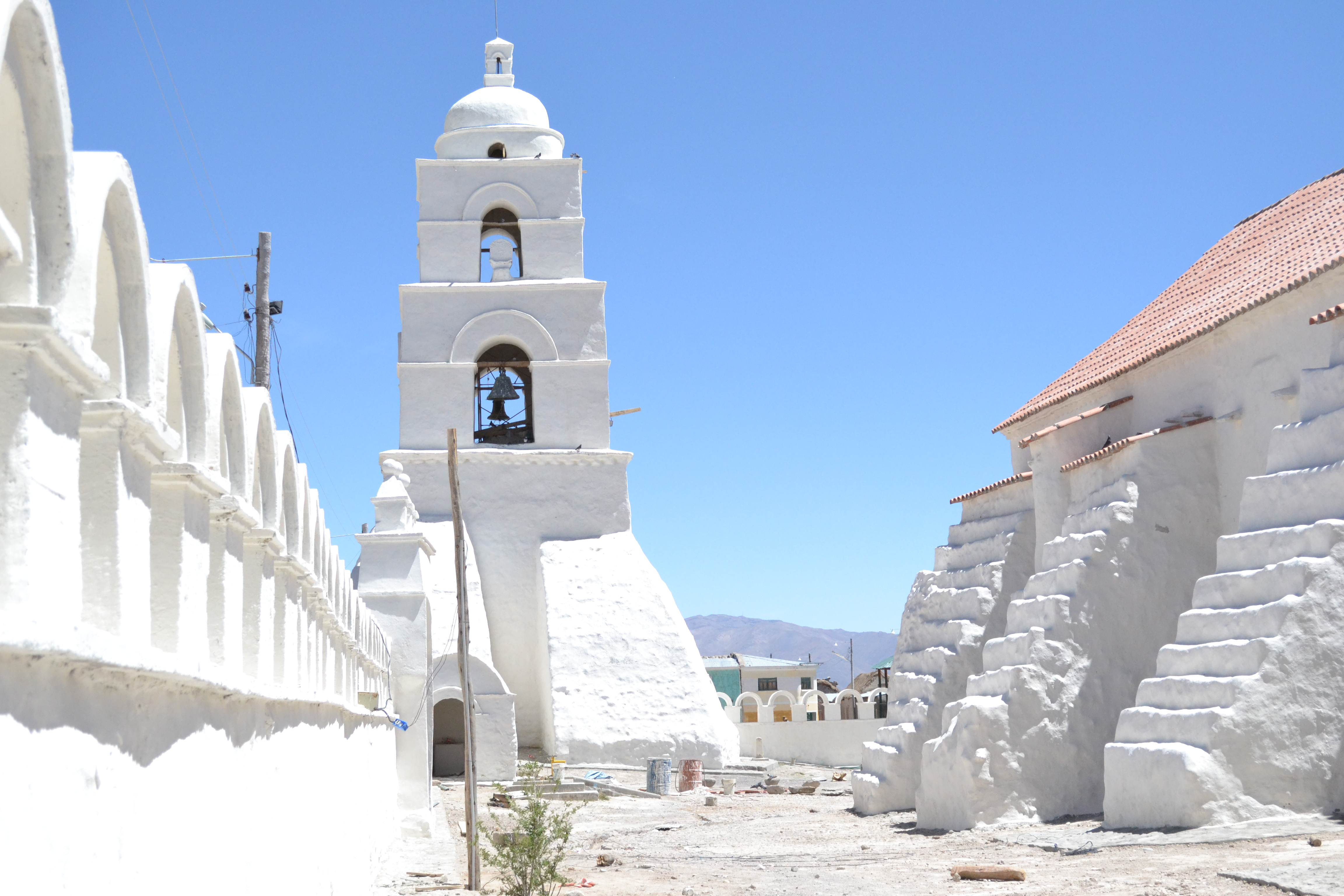 Santuario de Nuestra Señora de Sabaya This medium shows the protected monument with the number O/00-015 in Bolivia.